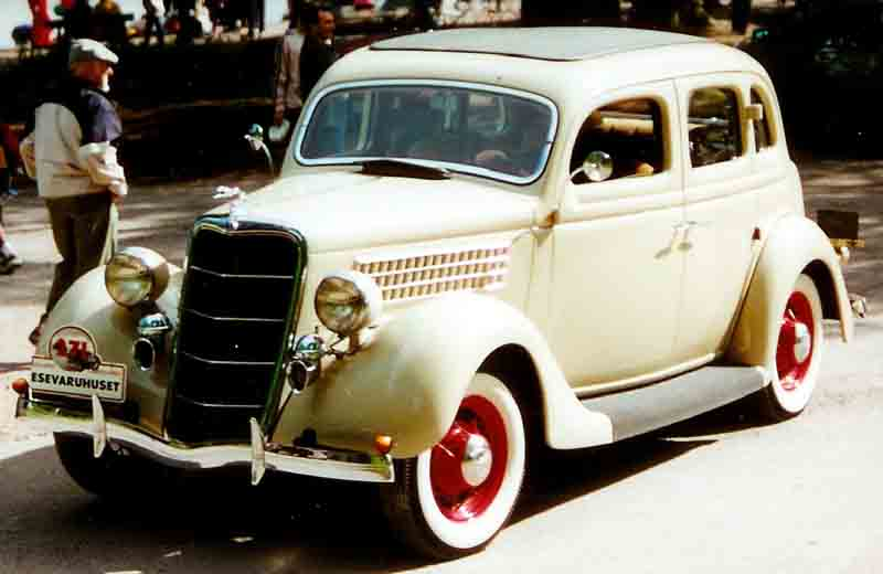 Ford Model 48 730 De Luxe Fordor Sedan 1935